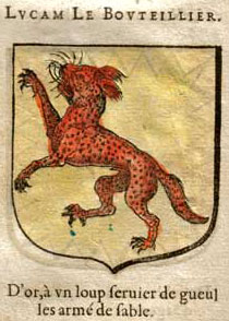 Lucam le Bouteillier portait d'or à loup-cervier de gueules armé de sable.